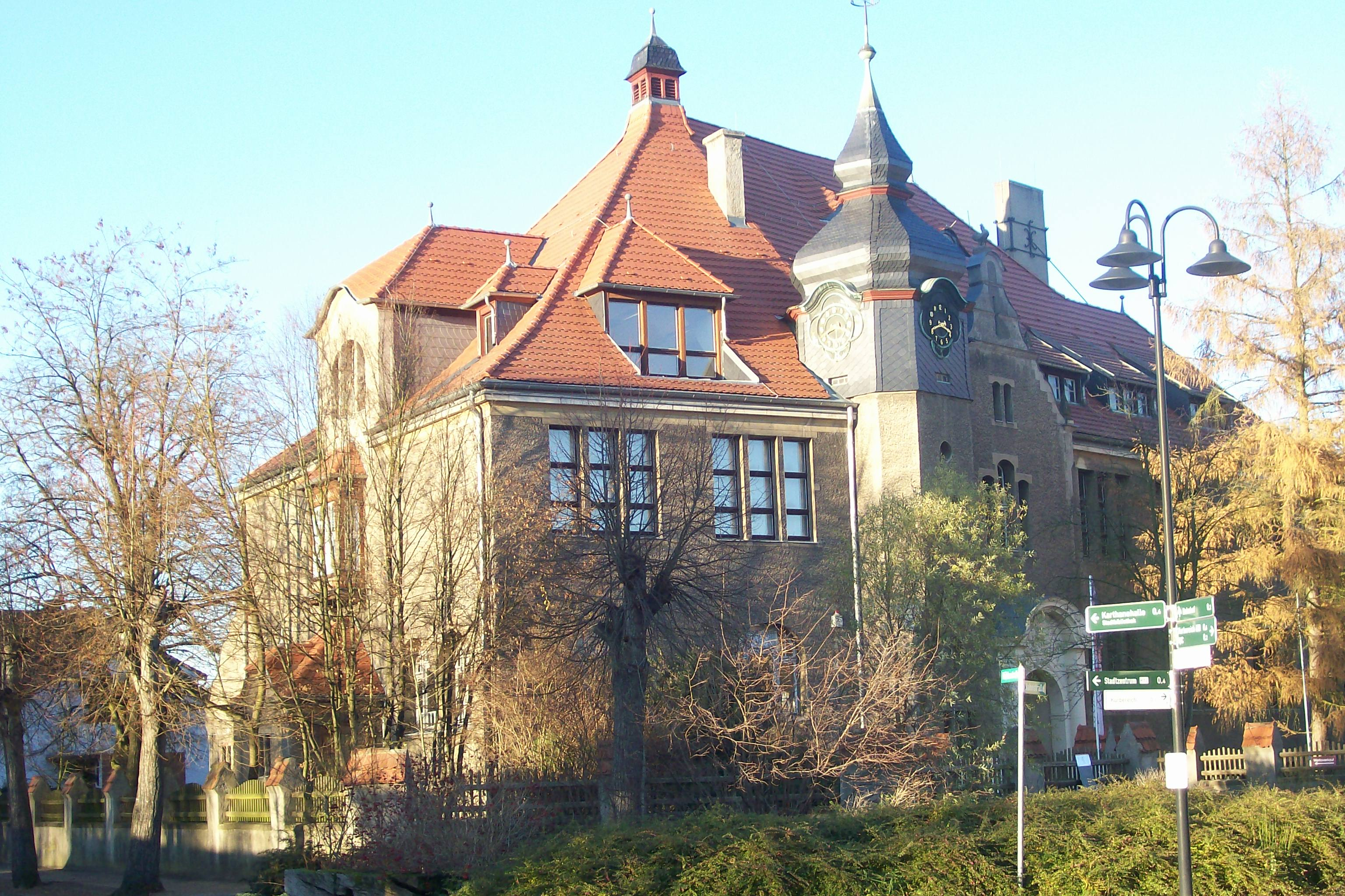 Ehemalige Jahnschule in Bad Wilsnack, 1911 erbaut, jetzt Sitz der Firma Cleo Schreibgeräte